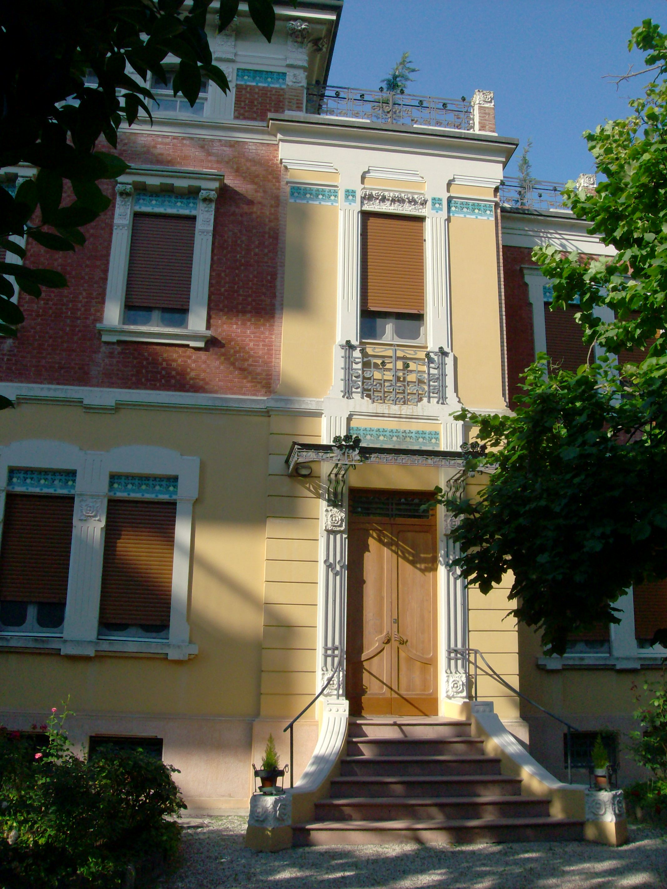 Villa Amalia in Viale Cavour 194 a Ferrara